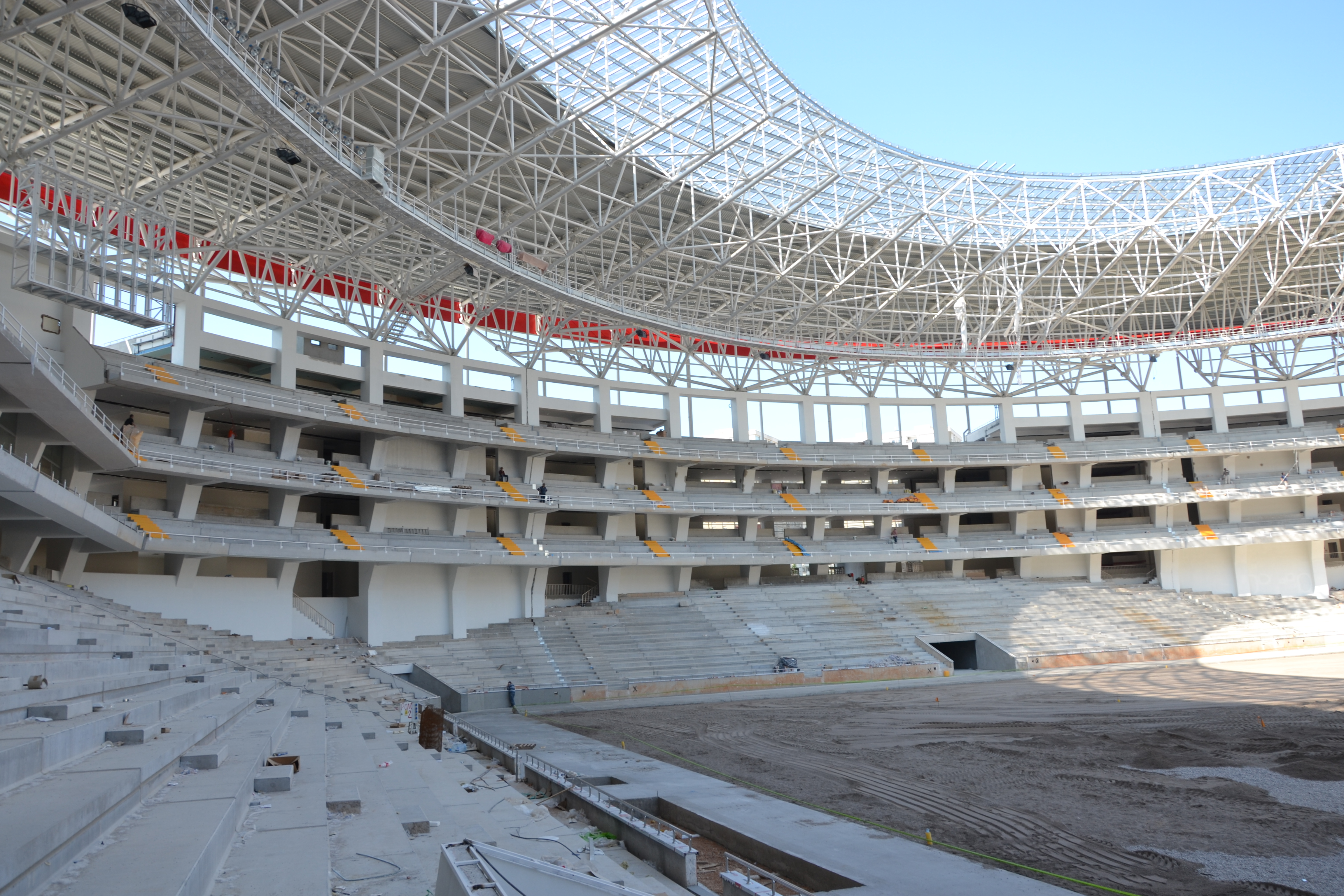 Antalya Arena İnşaatının Nisan 2015'teki durumu